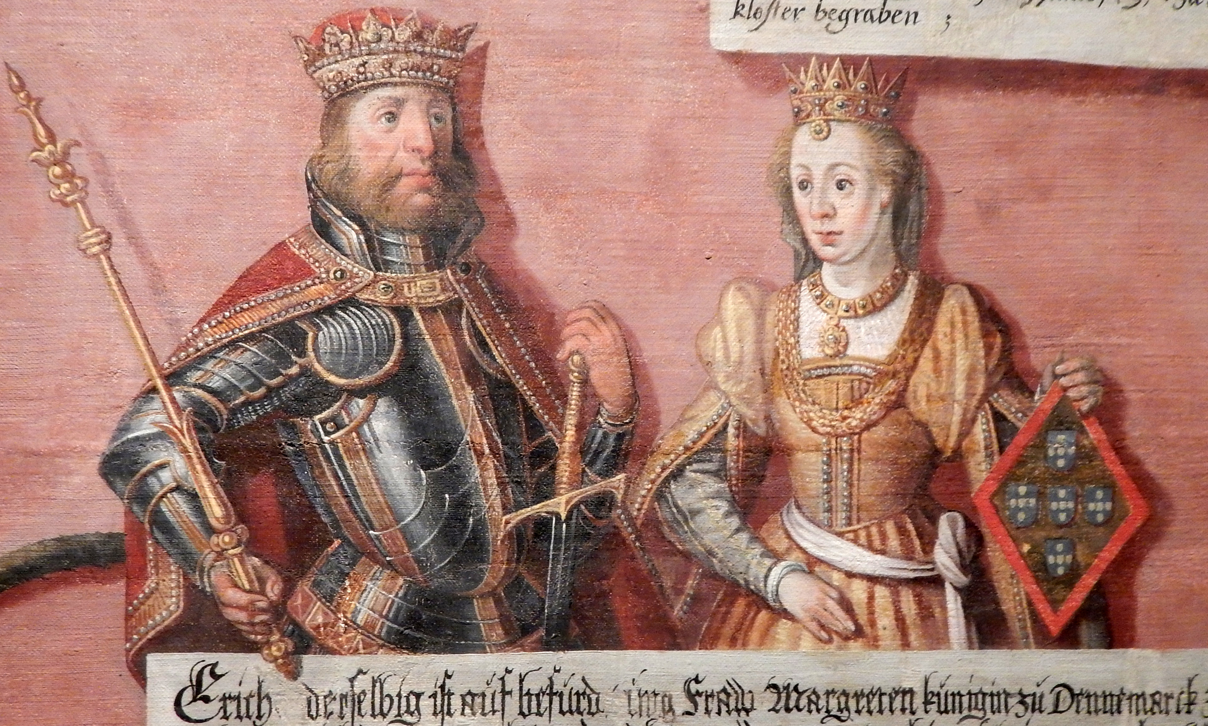 Erich I. von Pommern.